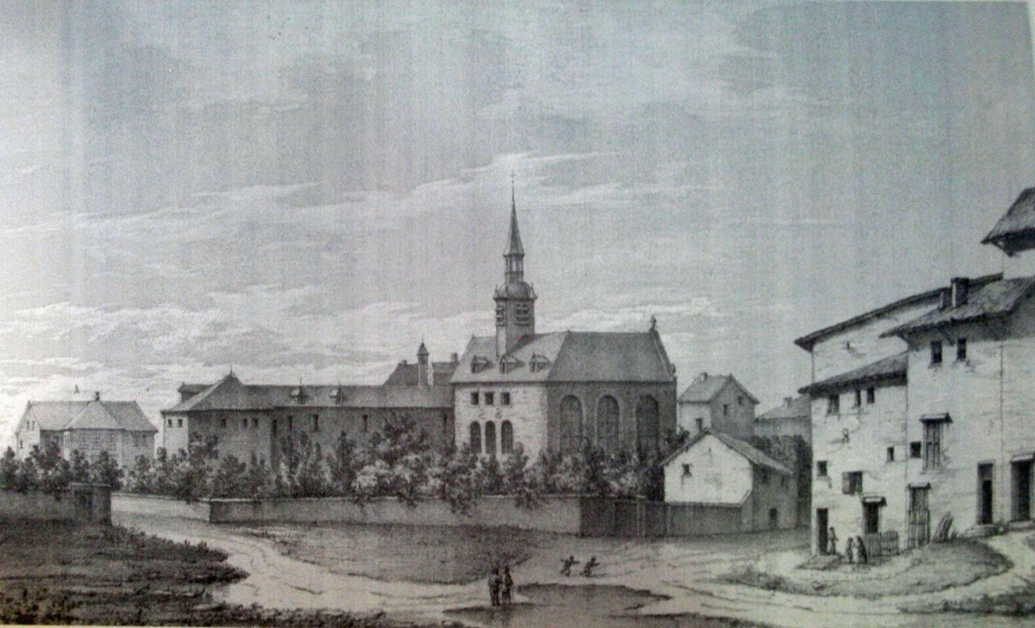 Gravure montrant le couvent de Vinetz au XIXe siècle.